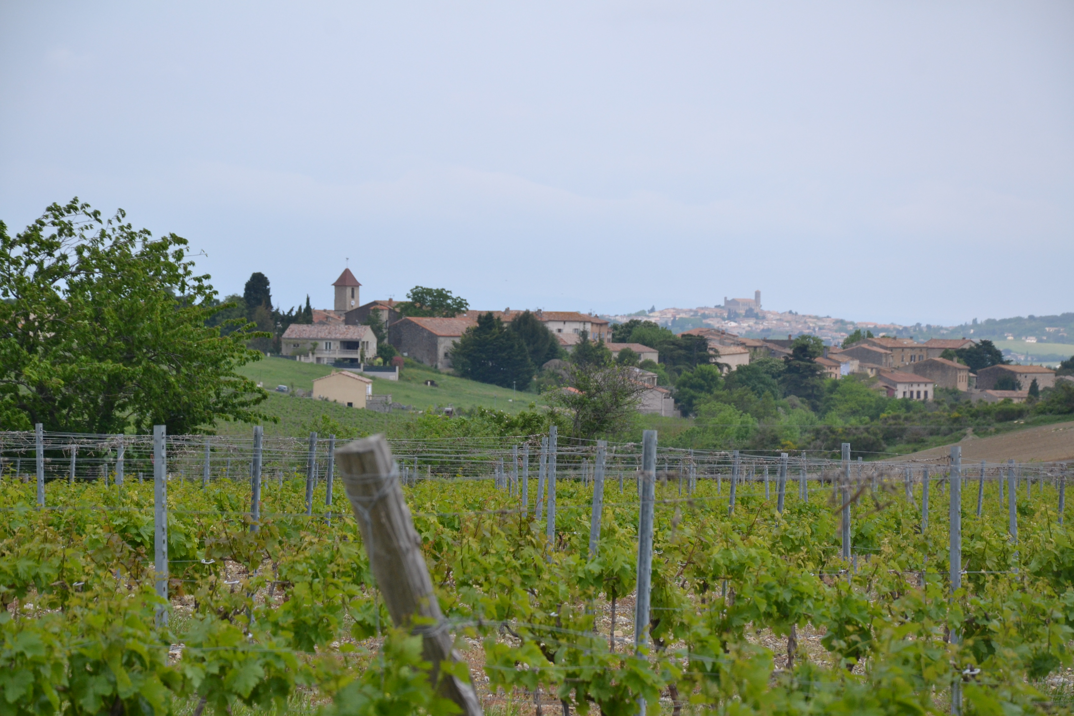 Vue sur le village de Lasserre-de-Prouille (Aude, France).